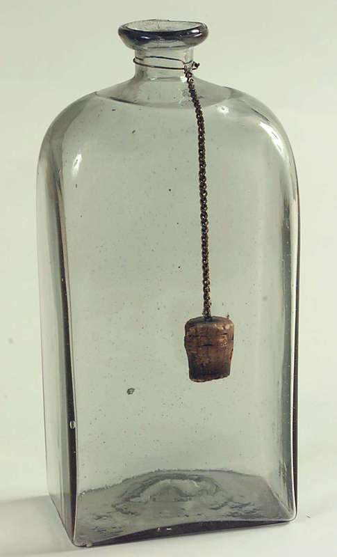 Kantineflaske fra 1700-årene med kork festet til en messinglenke. Den er antakelig produsert på Nøstetangen glassverk. Høyde 21,5 cm. Foto Anne-Lise Reinsfelt/Norsk Folkemuseum, NF.1900-0122.